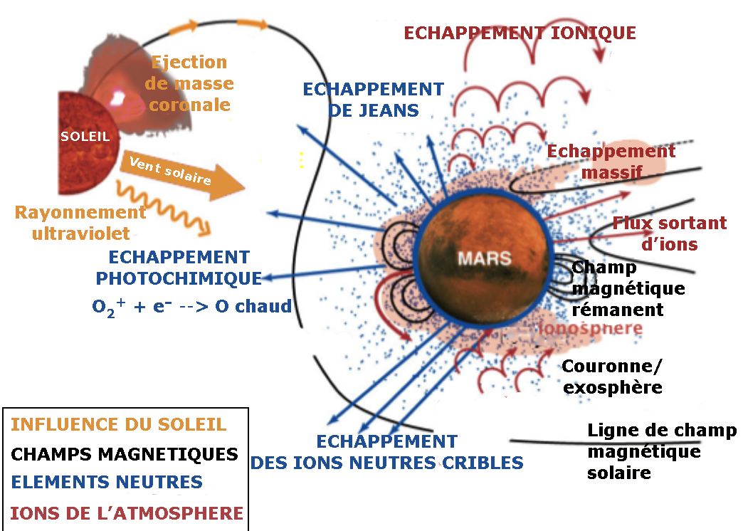 Échappement atmosphérique de l'atmosphère martienne : les processus à l’œuvre (schéma réalisé par les concepteurs de la mission MAVEN de la NASA)